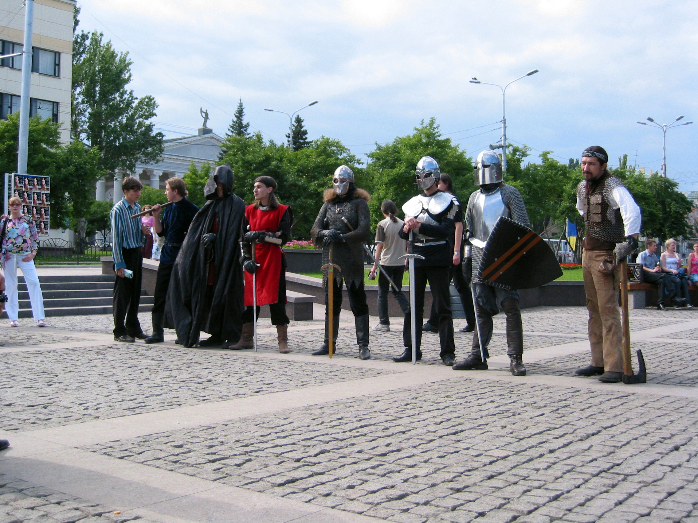 Клуб «Мифрил» на Дне молодёжи 2005 в Донецке